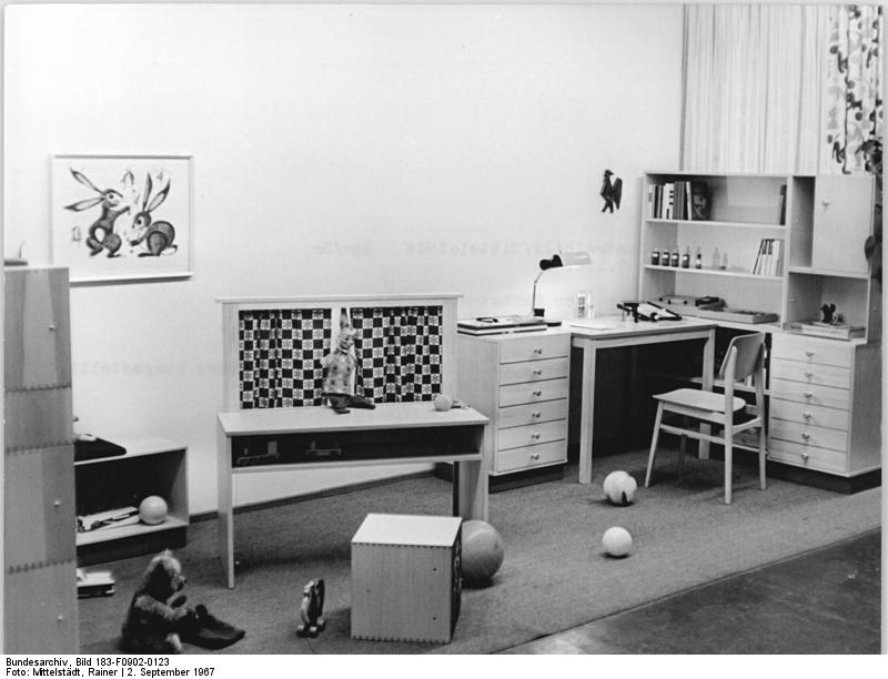 Kinderzimmer, H. Schmidt KG Wernigerode Zentralbild Mittelstädt Bgm-SZ 2.9.1967 Leipziger Herbstmesse 1967 Messehaus Union: Das Kinderzimmer "Teddy" wird von der H. Schmidt KG Wernigerode-Harz ausgestellt. Es besteht aus sieben Teilen.